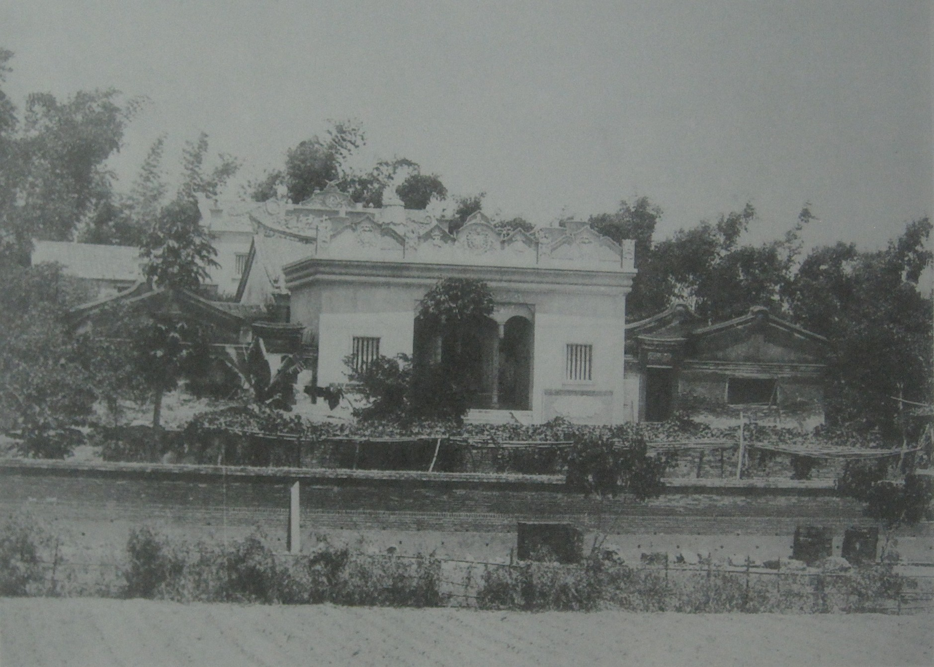 1933年前的臺南竹溪寺